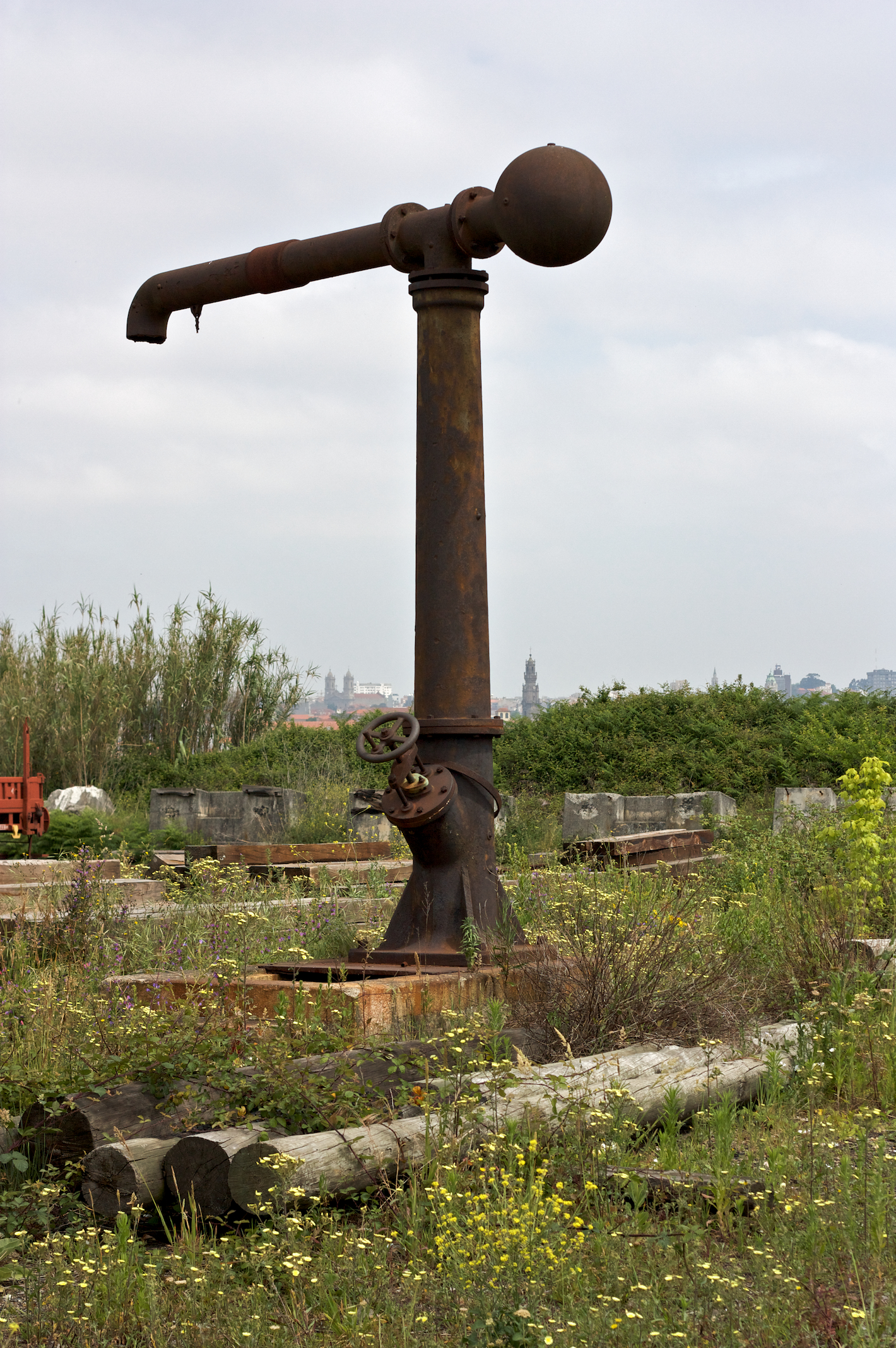 antiga toma de água para locomotivas a vapor. Tipo: E [ Estação ] Local: Vila Nova de Gaia [Linha do Norte , PK 332] Data e hora: 7 de Maio de 2009 [11h58]